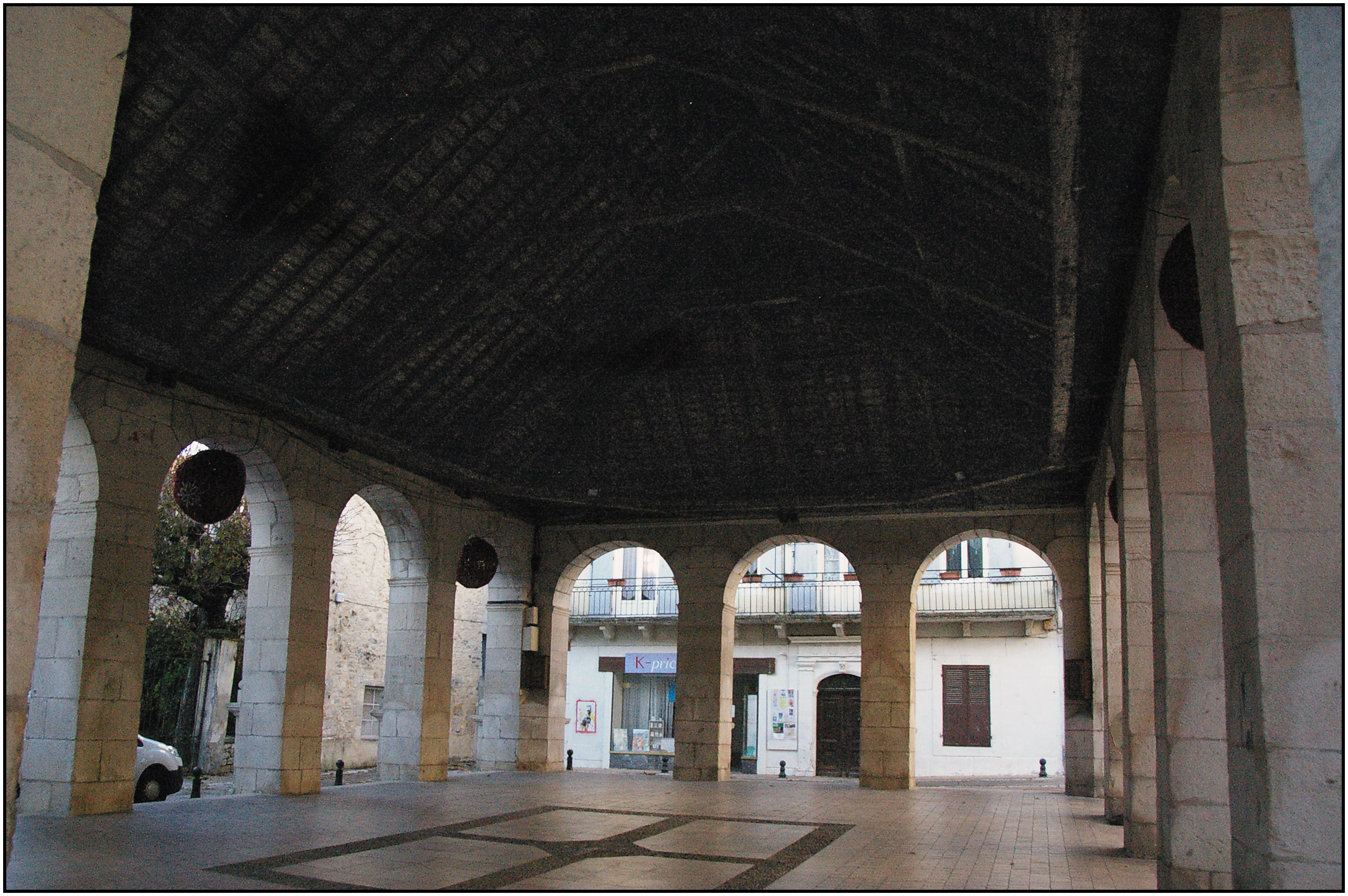 Halle de Souillac